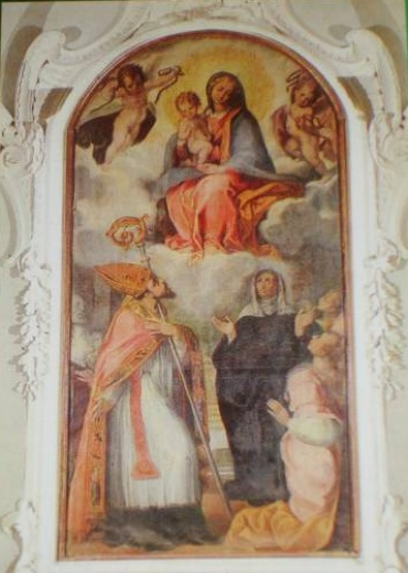 Antonio Cimatori - Madonna della Cintura con San Agostino e Santa Monica - (affresco) Chiesa di SantAgostino - Urbino